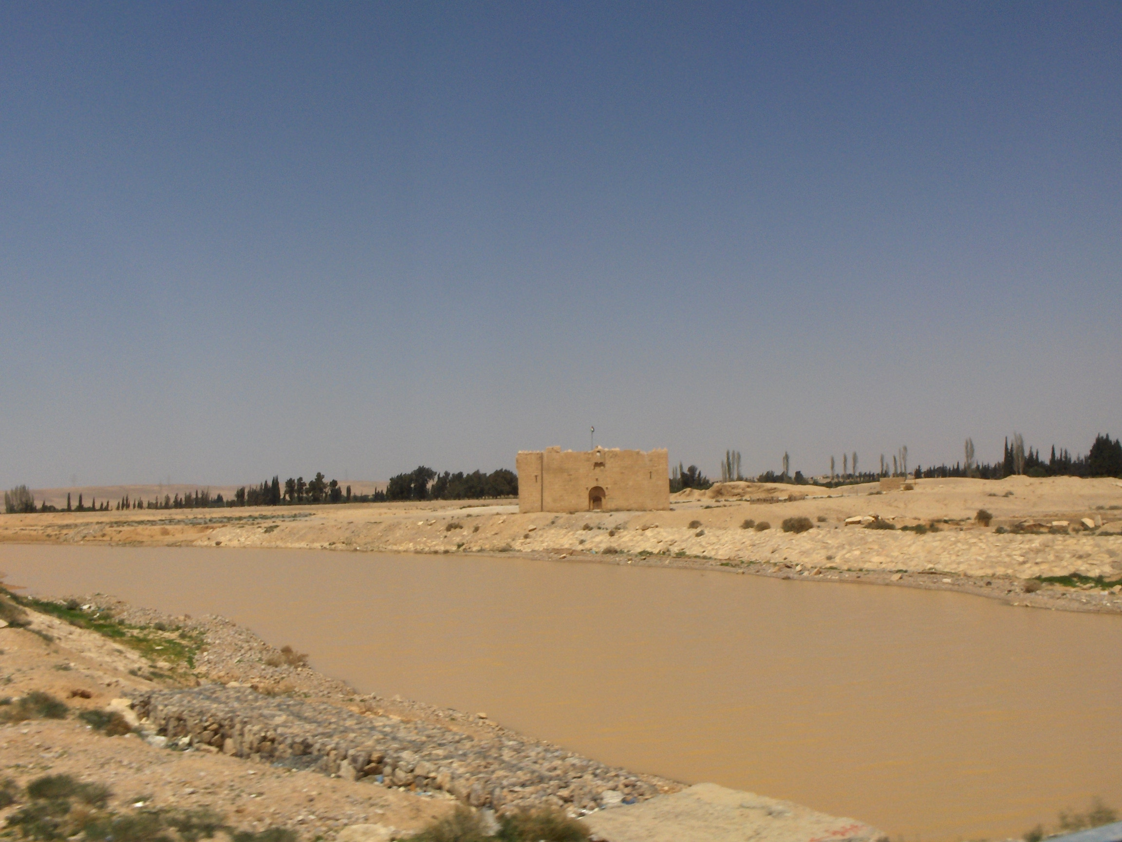 Vasca di acqua nel deserto per irrigare le nuove coltivazioni, Giordania